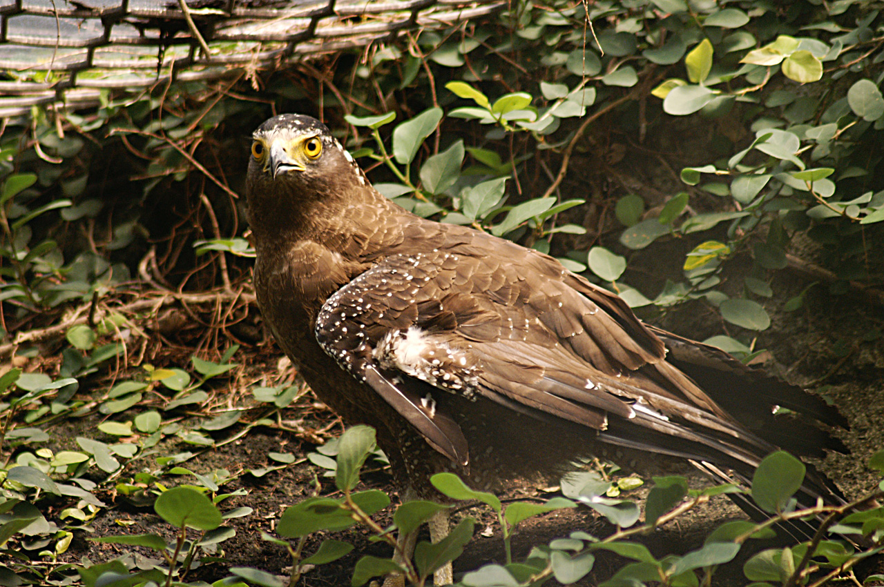 大冠鷲；於台北市立動物園